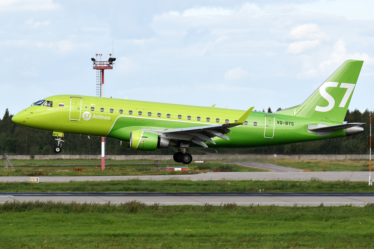 S7 Airlines, VQ-BYS, Embraer ERJ-170SU